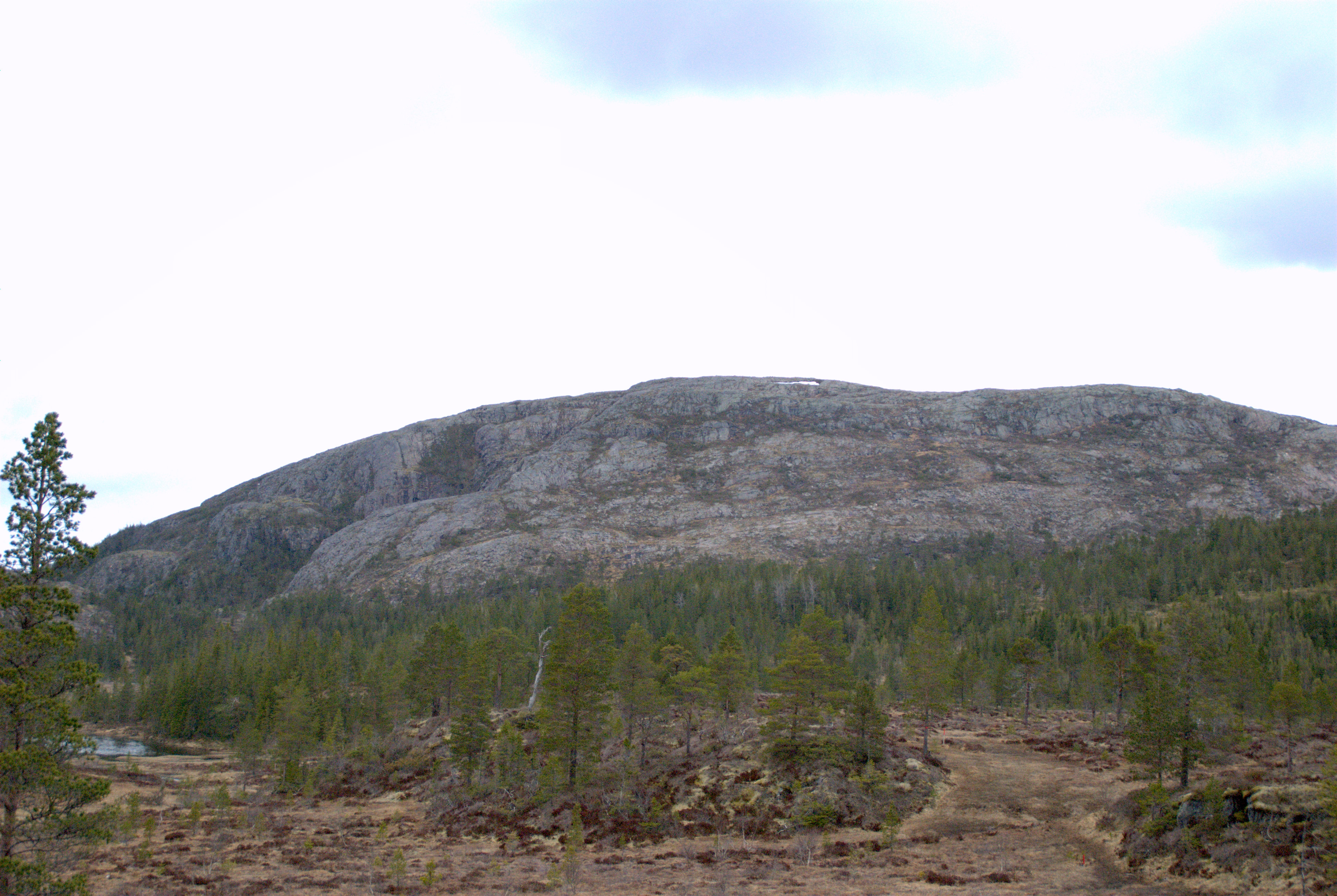 Seksortklumpen på Nyvassdalsheian nordøst i Bjugn kommune i Sør-Trøndelag.